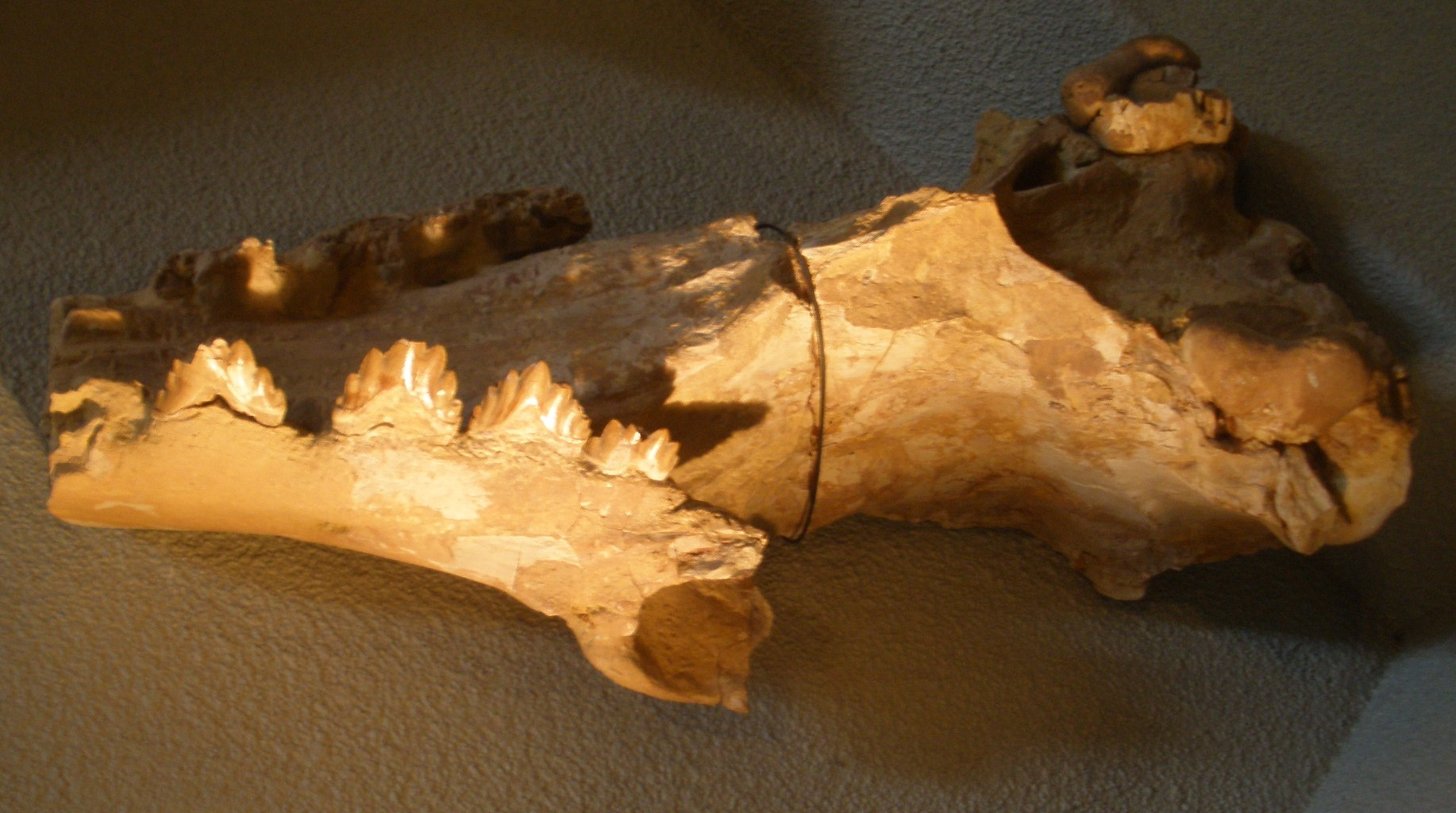 Fossil of Saghacetus, an extinct whale - Took the photo at Naturalis museum, Leiden